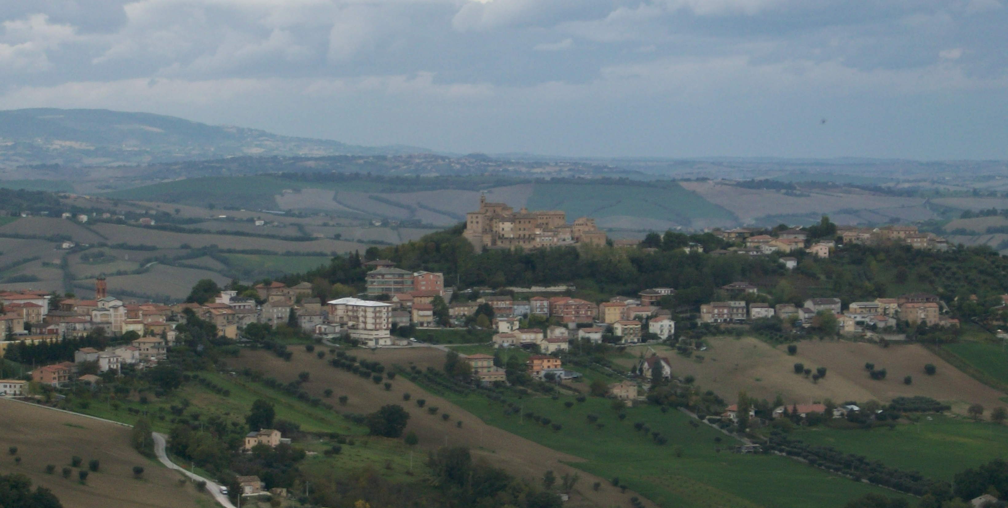 Montappone